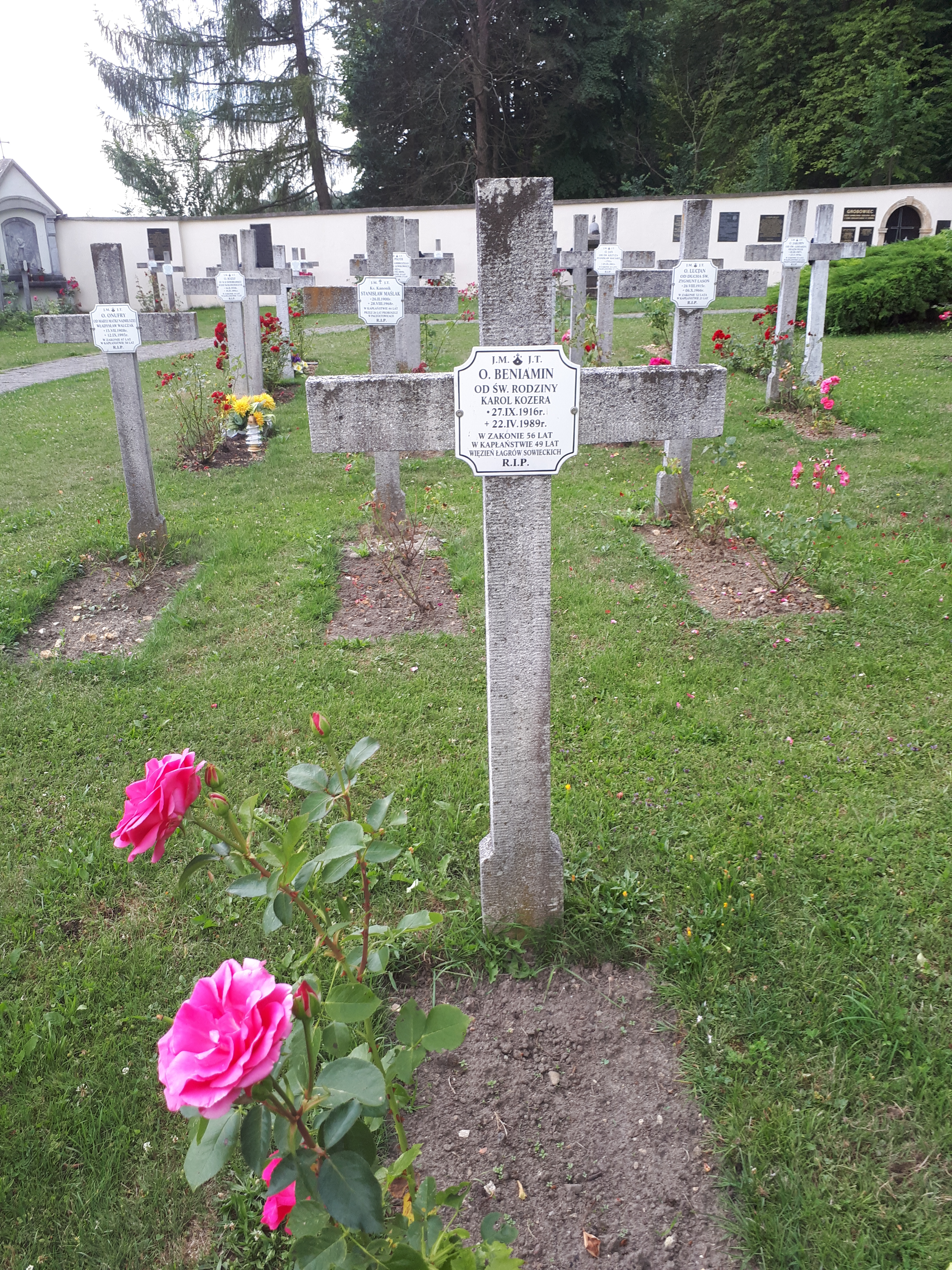 Grób karmelity o. Beniamina Kozery, proboszcza parafii w Postawach w latach 1944-1949, cmentarz w klasztorze karmelitów bosych w Czernej.